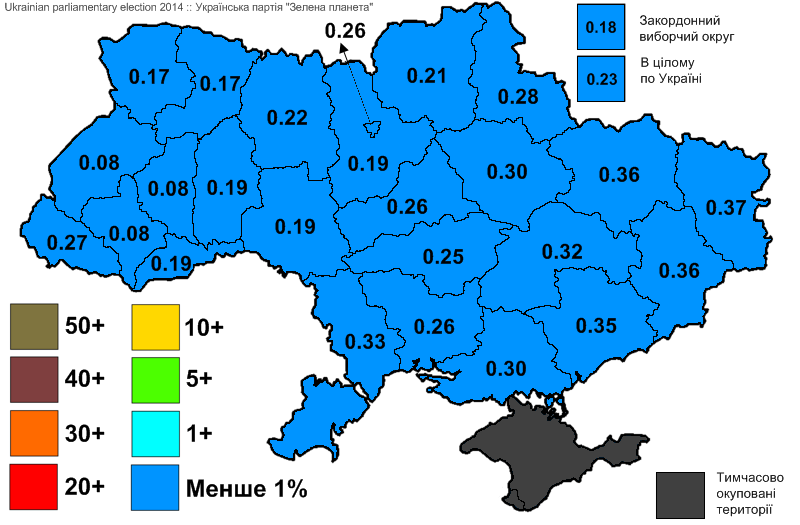 Результати виборів до Верховної Ради України, які відбулись 25 жовтня 2014 року. Інформація з офіційного сайту ЦВК. Українська партія "Зелена планета".